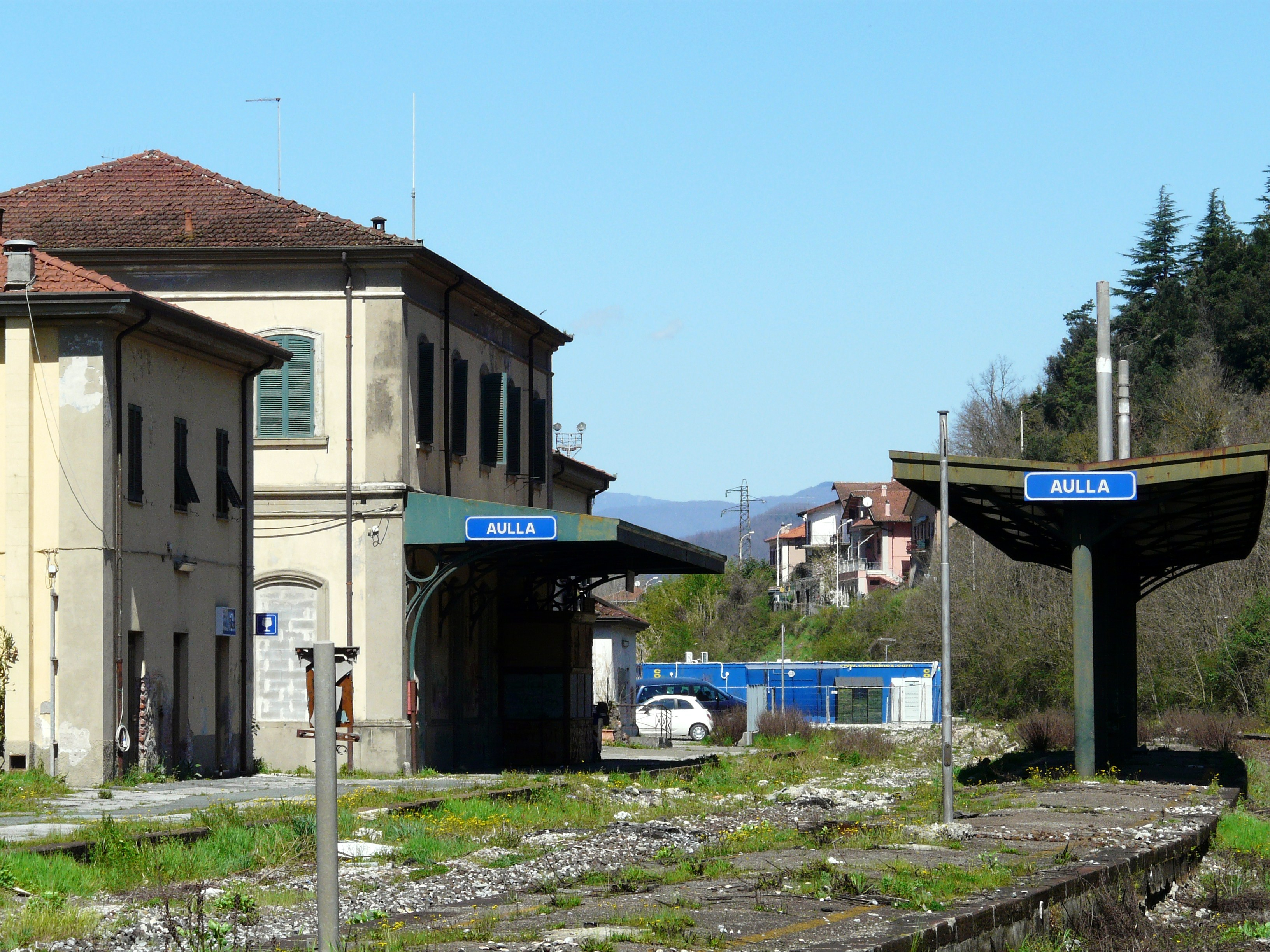 Vecchia stazione ferroviaria di Aulla, Toscana, Italia